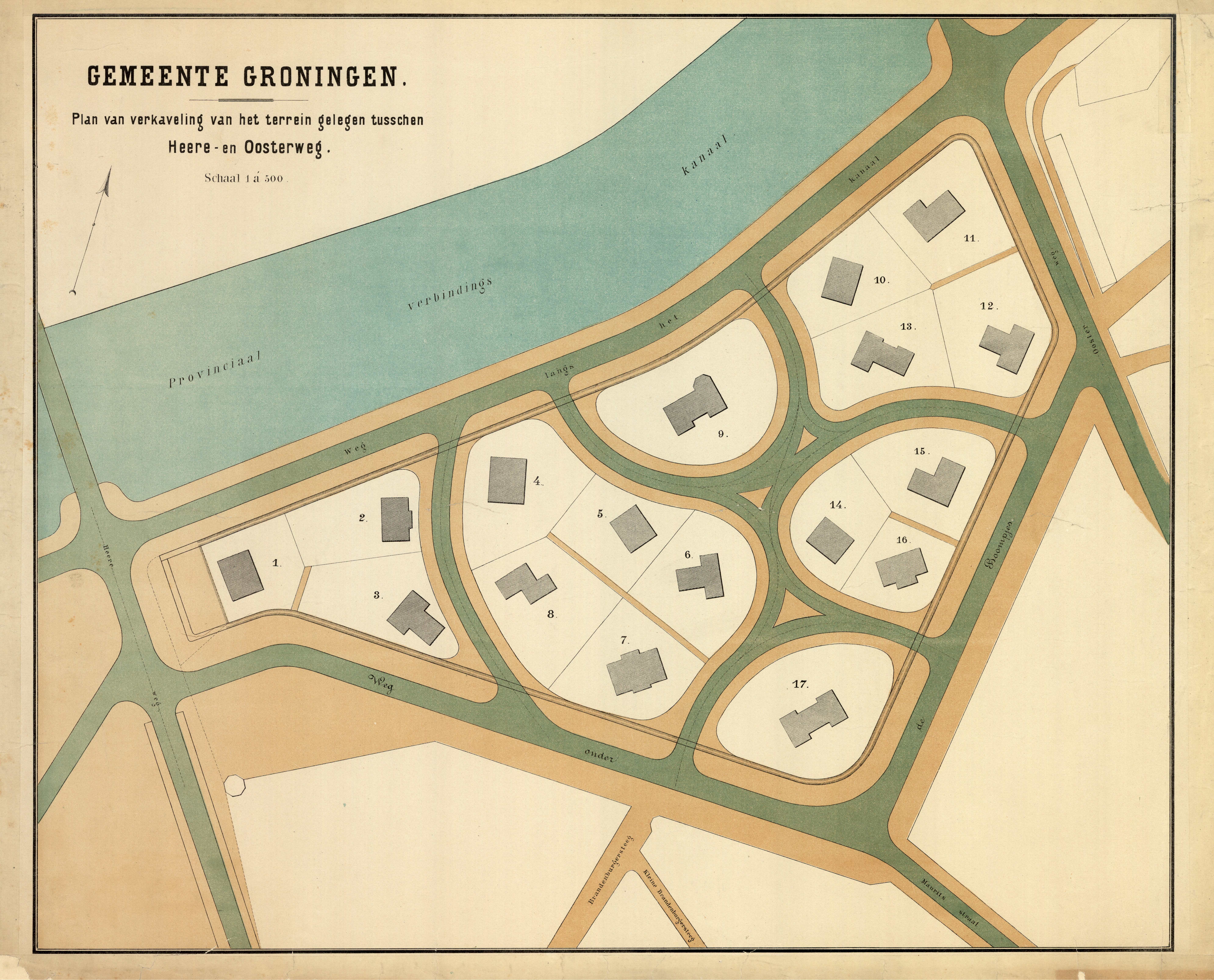 Plan van verkaveling van het terrein gelegen tusschen Heere- en Oosterweg. Het kavelplan van het Zuiderpark in Groningen